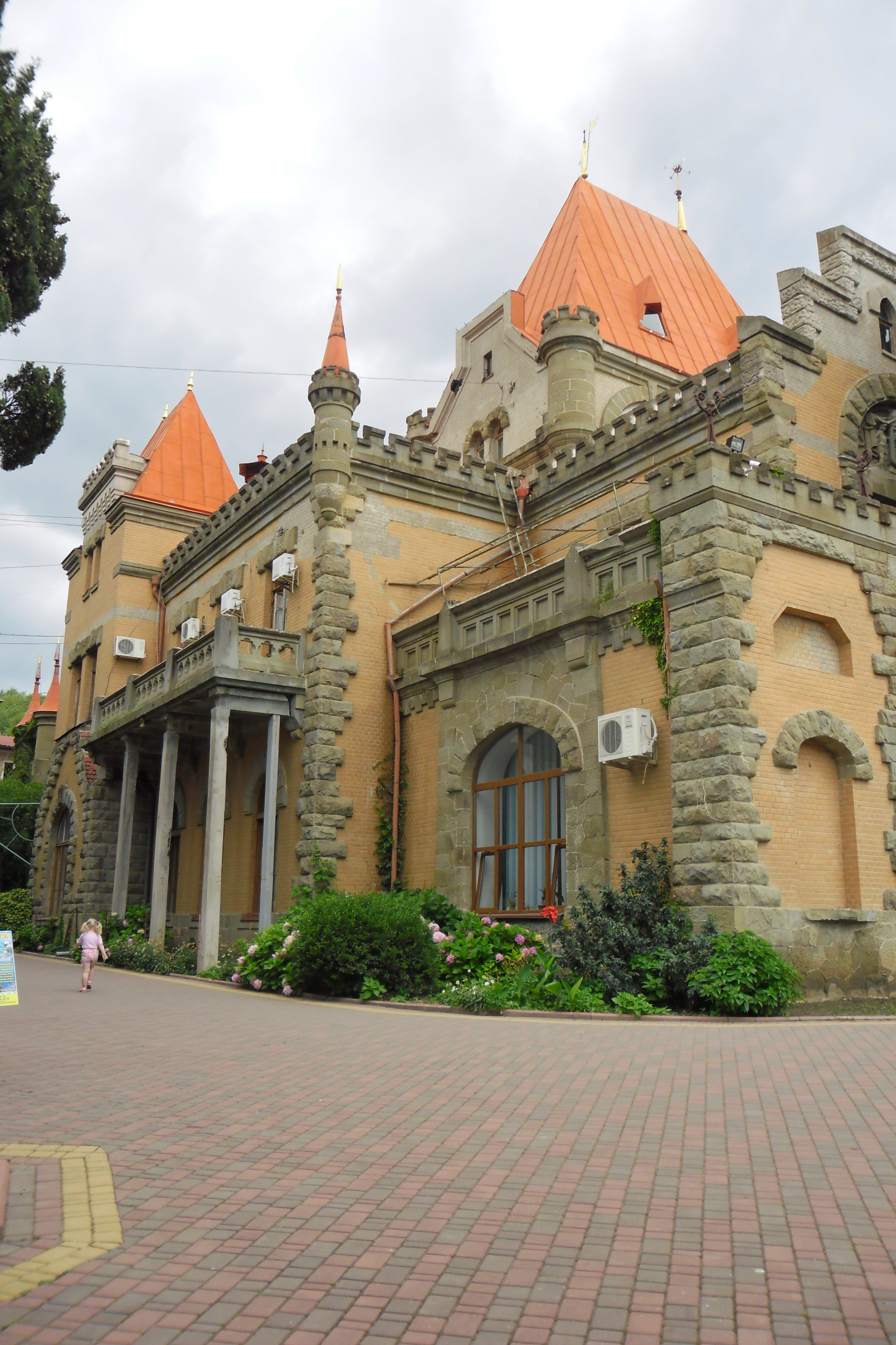 Фото